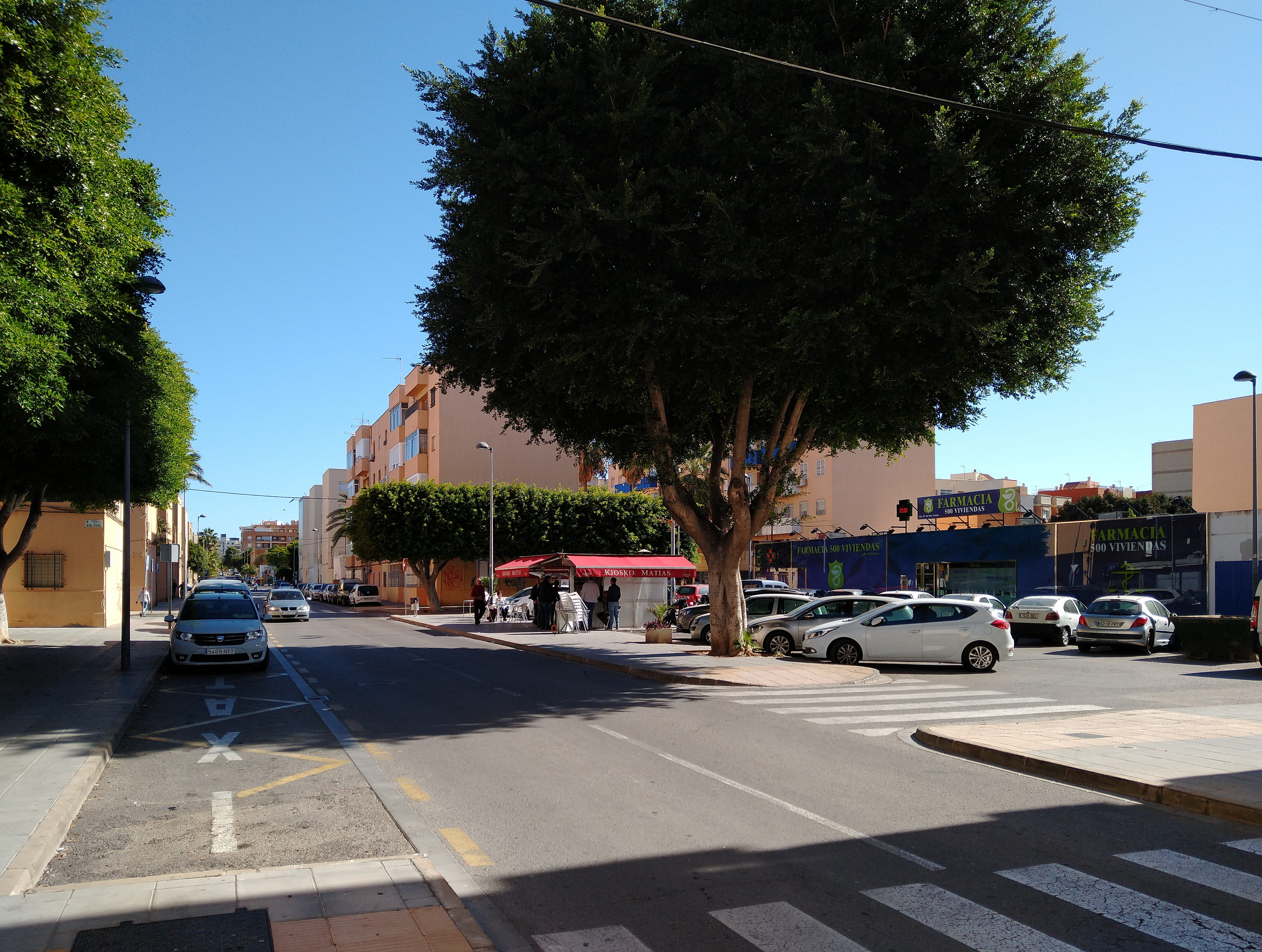 Vista del centro del barrio de las 500 Viviendas.